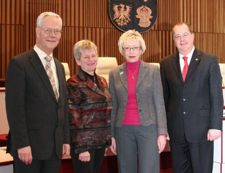 Präsidium des Landtages Mecklenburg-Vorpommern: Vizepräsident Hans Kreher (FDP), Vizepräsidentin Renate Holznagel (CDU), Landtagspräsidentin Sylvia Bretschneider (SPD), Vizepräsident Andreas Bluhm (Die Linke) (v.l.n.r.)